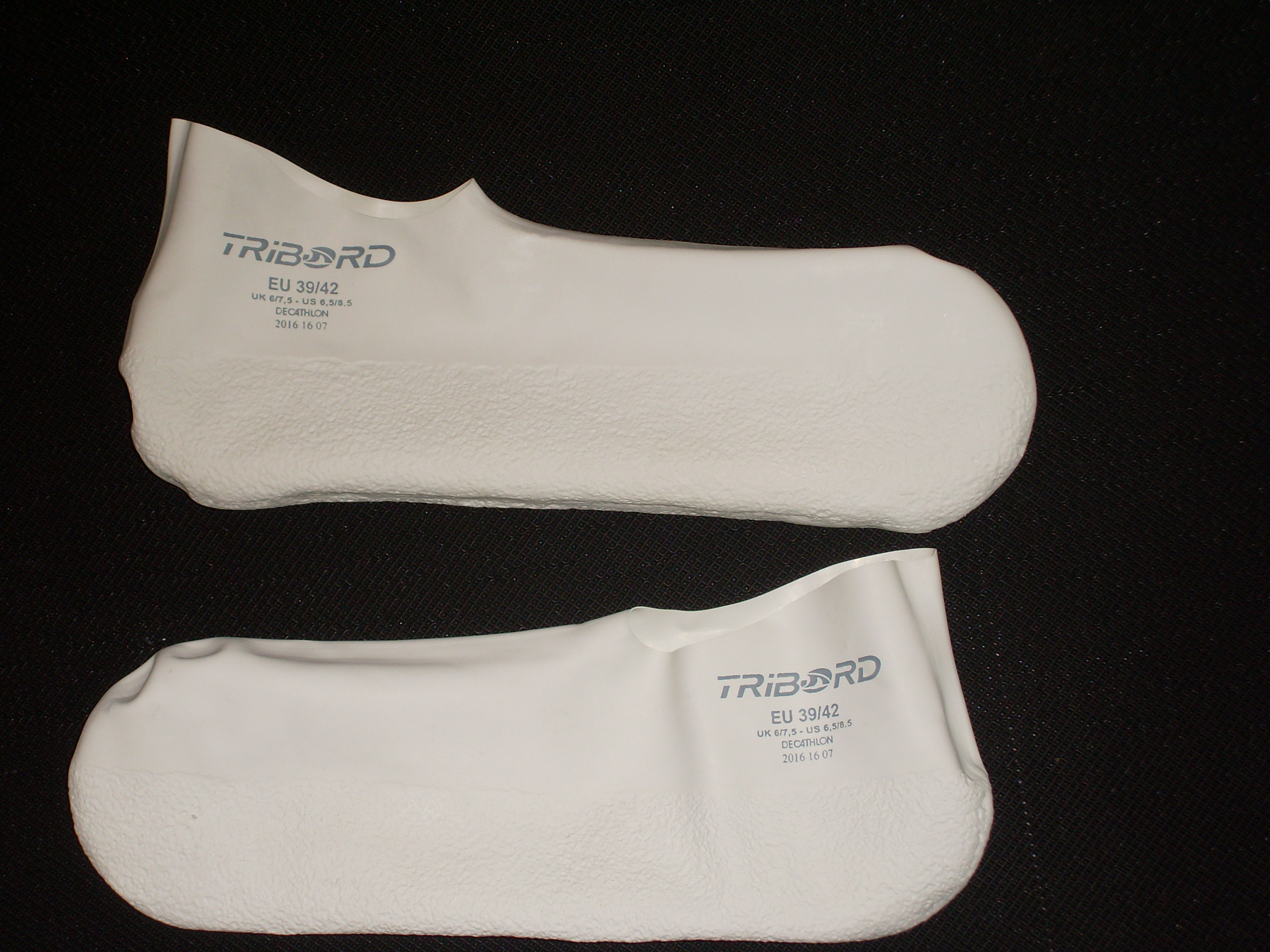 Une paire de chaussons de piscine anti-verrues de marque Tribord.